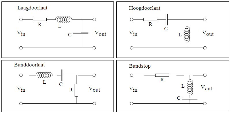 De vier passieve 2de orde filters gebaseerd op één weerstand, één condensator en één spoel